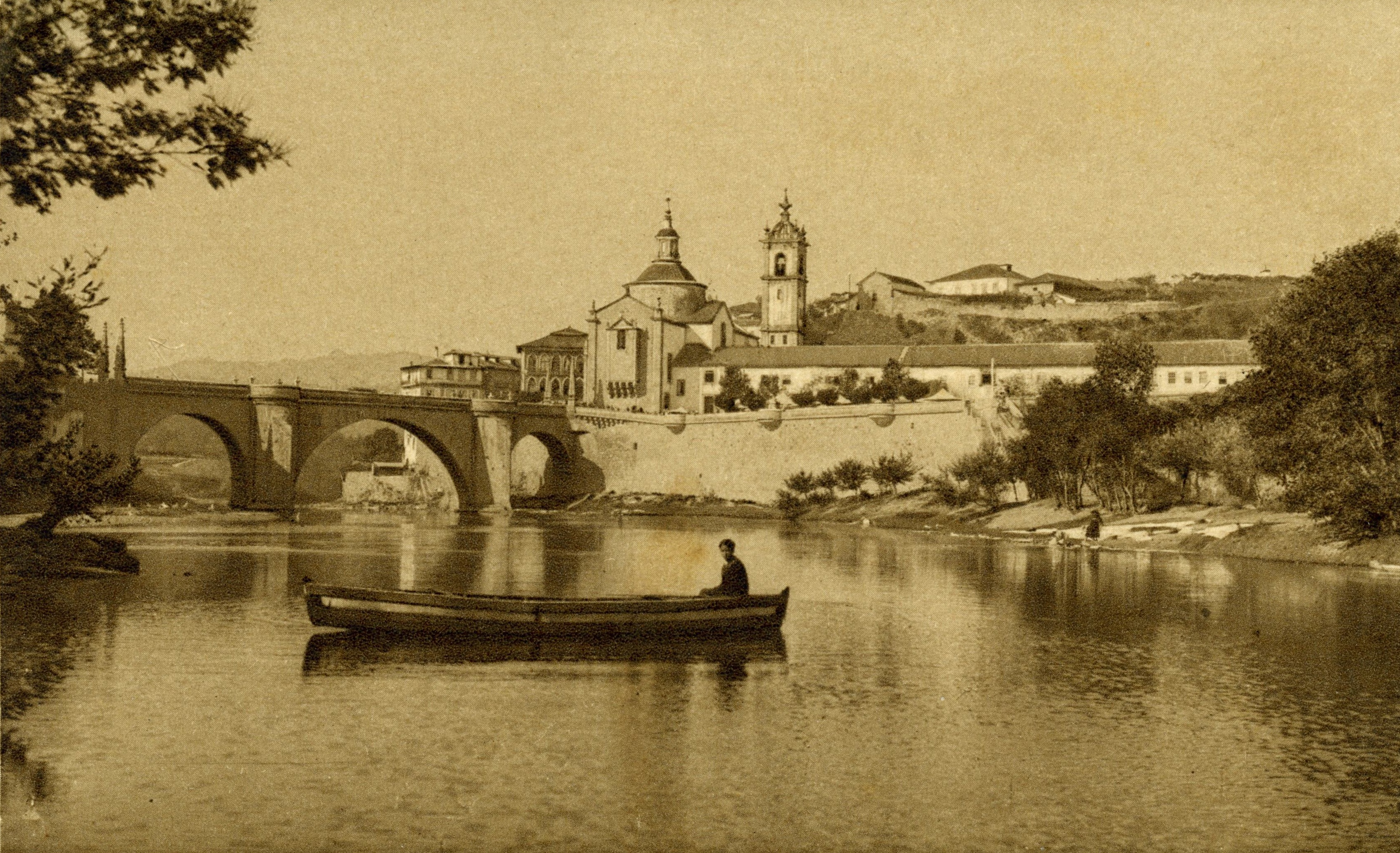 Vue d'Amarante, sur la rivière Tâmega. portugal